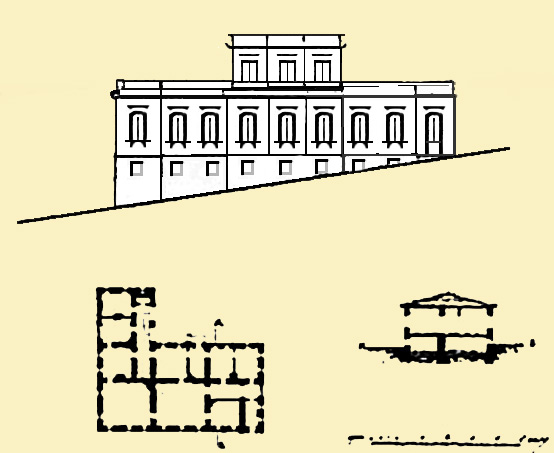 Проєкт надбудови мезоніну 1862 року. Інженер Беристовський, . Особняк купця Давида Трахтенберга, Київ, вул. Трьохсвятительська, 5/1